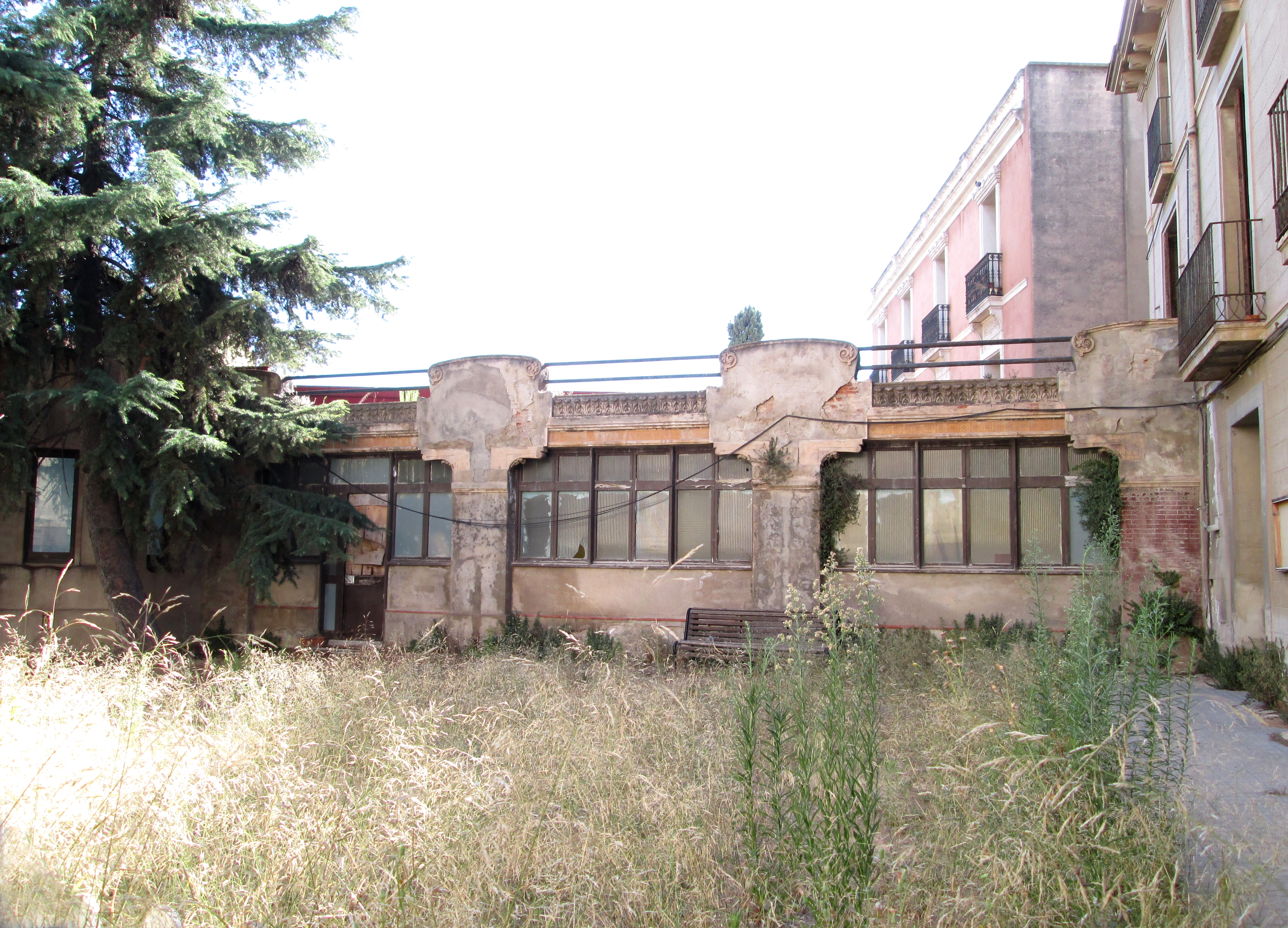 Casa Marcet Font, antigua vivienda unifamiliar utilizada posteriormente como escuela privada, construida a mediados del siglo XIX. En 1903 Juli Batllevell añadió el pabellón-mirador de estilo modernista situado en el jardín de forma perpendicular a la casa. En la actualidad la casa esta en desuso. Se encuentra situada en la calle Joan Maragall, 7 / plaza del Gas, de Sabadell, Barcelona (España).